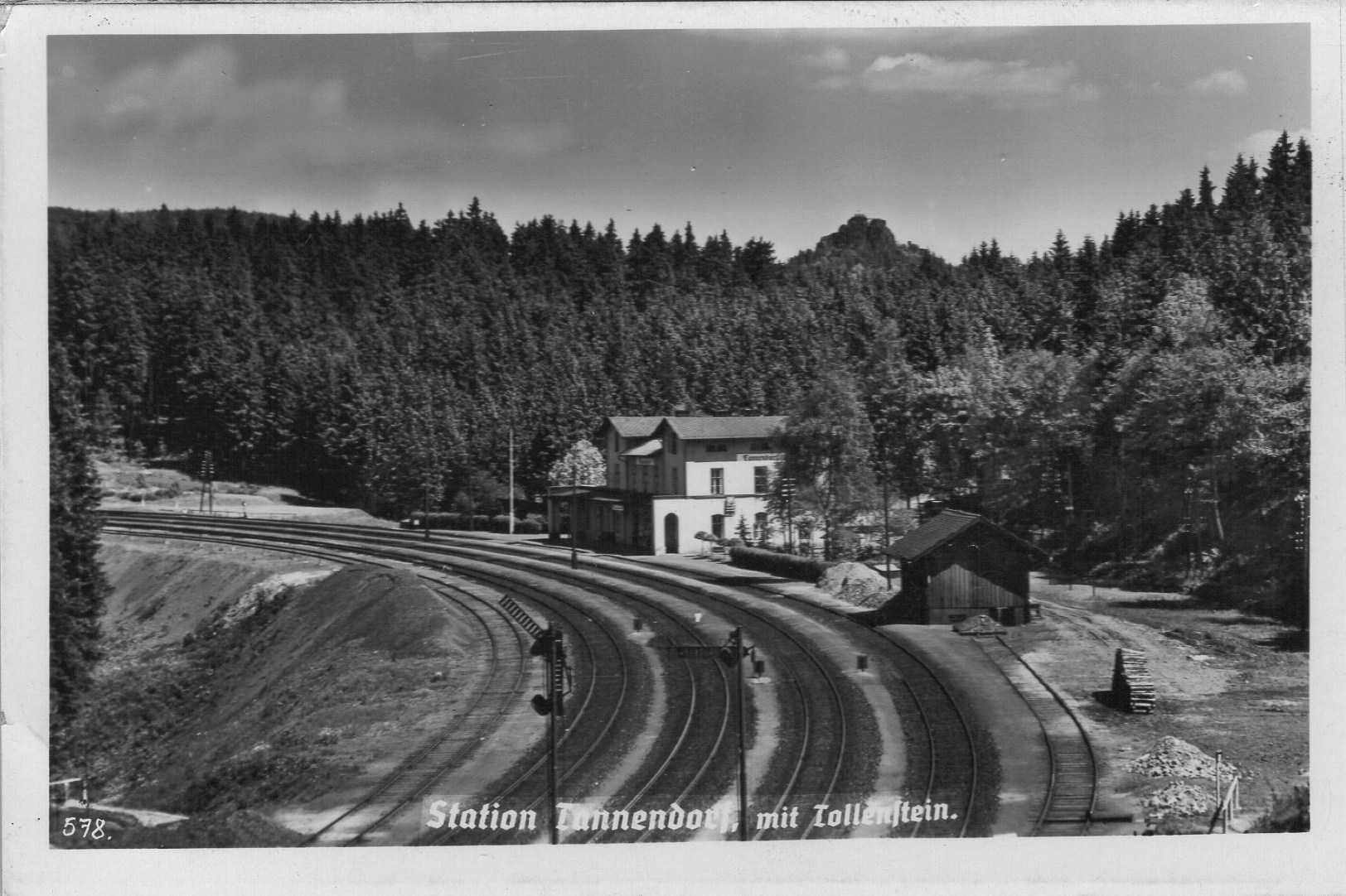 Jedlovské nádraží